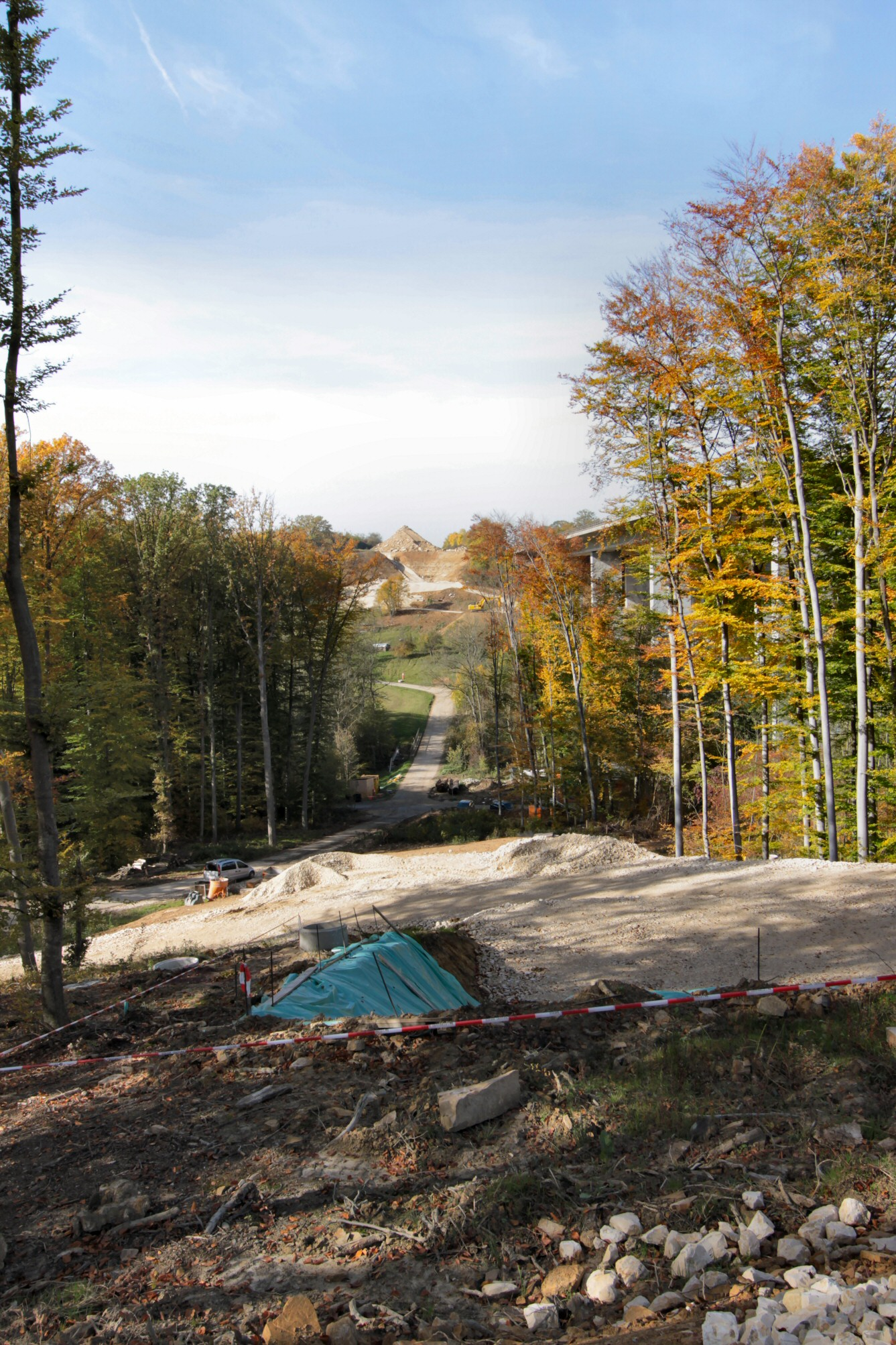 Blick vom südöstlichen Widerlager über die Baustelle der neuen Sulzbachtalbrücke im Oktober 2012. Rechts hinter den Bäumen ist die parallele Brücke der Autobahn A8 Stuttgart - Ulm zu erkennen